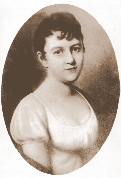 Portrait der Eleonore Johanna Piefke, Ehefrau des Oberamtmanns Karl Friedrich Lüdke